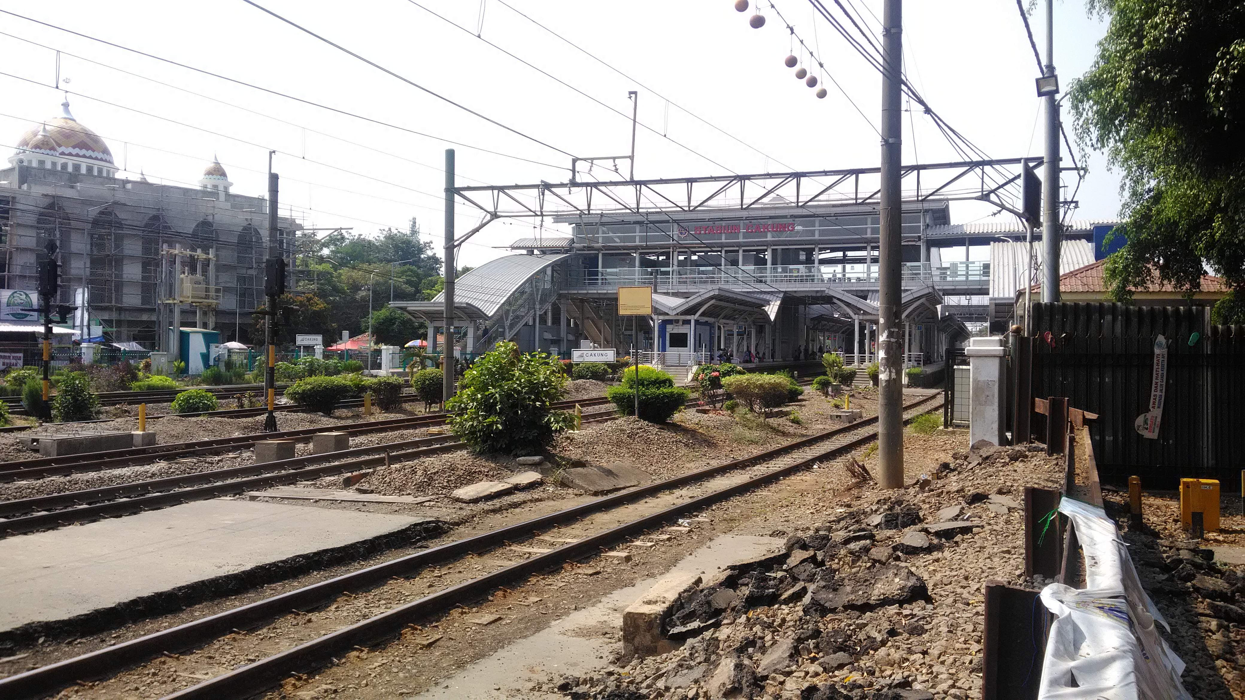 Stasiun Cakung, 2019